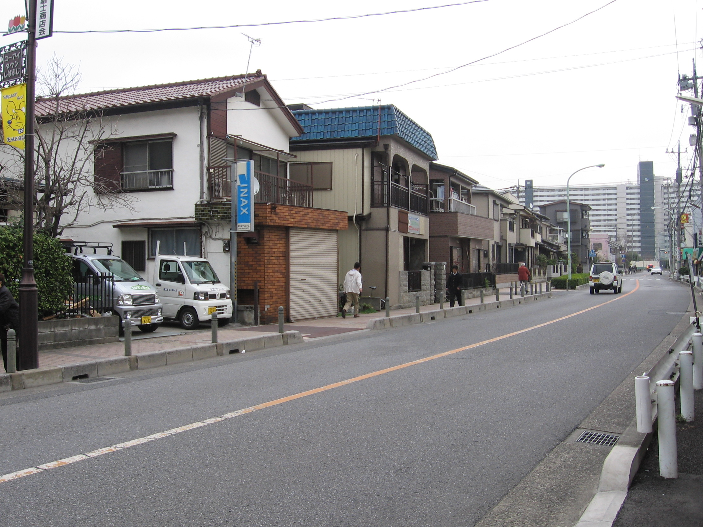 Kitamachisindori in Saitama-ken,Japan